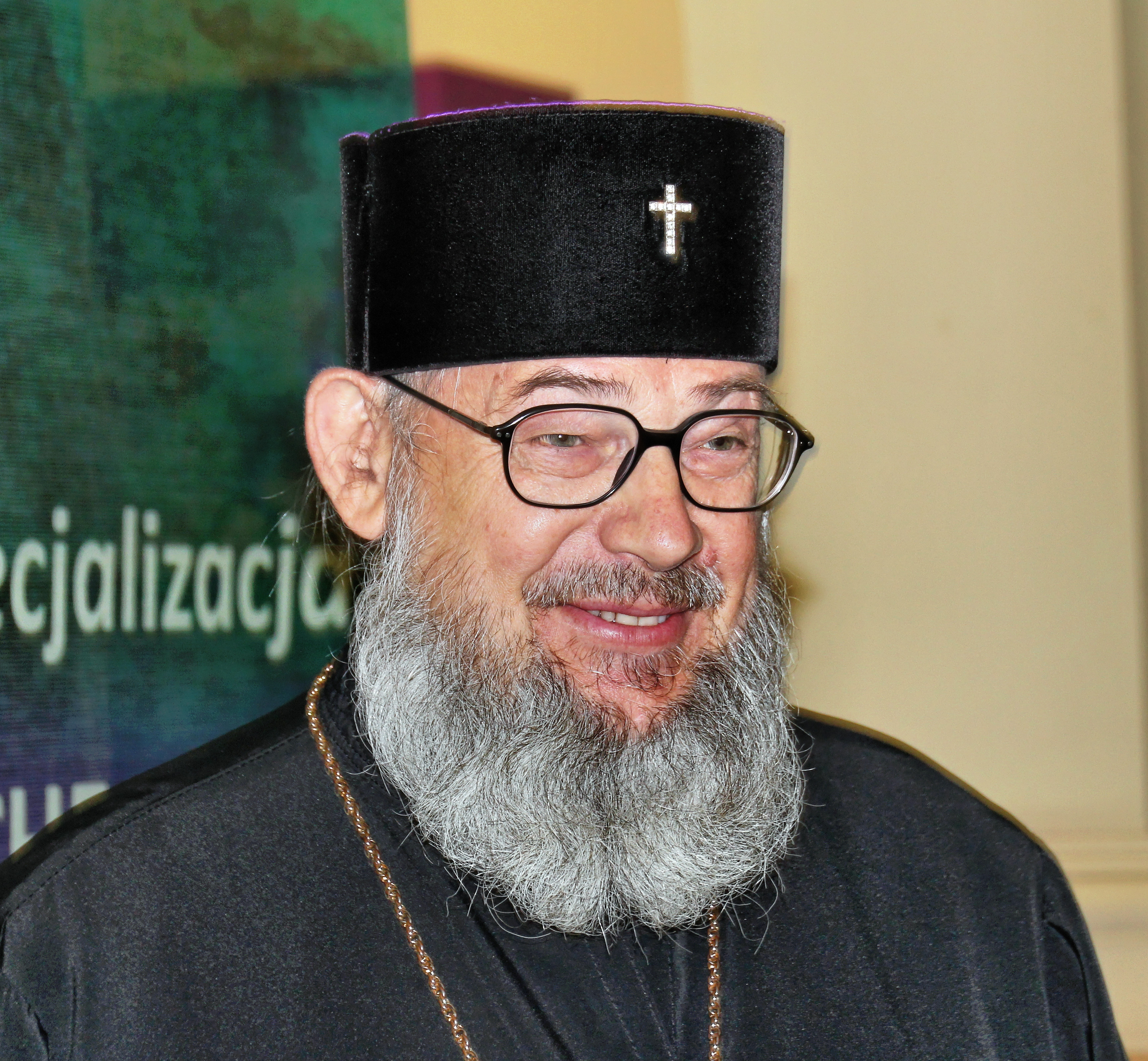 Erzbischof Jeremiah of Wrocław and Szczecin beim Kolloquium zur Preisverleihung der Adalbert-Stifung an Ján Čarnogurský